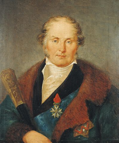 Беларуская (тарашкевіца): Партрэт Станіслава Солтана (Stanisłaŭ Sołtan)